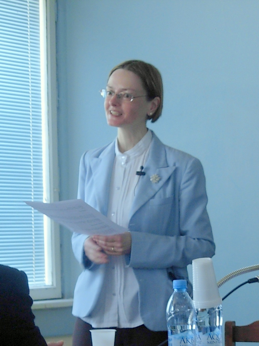 Бальбина Беблер (с лекцией в МГУ имени М.В. Ломоносова)